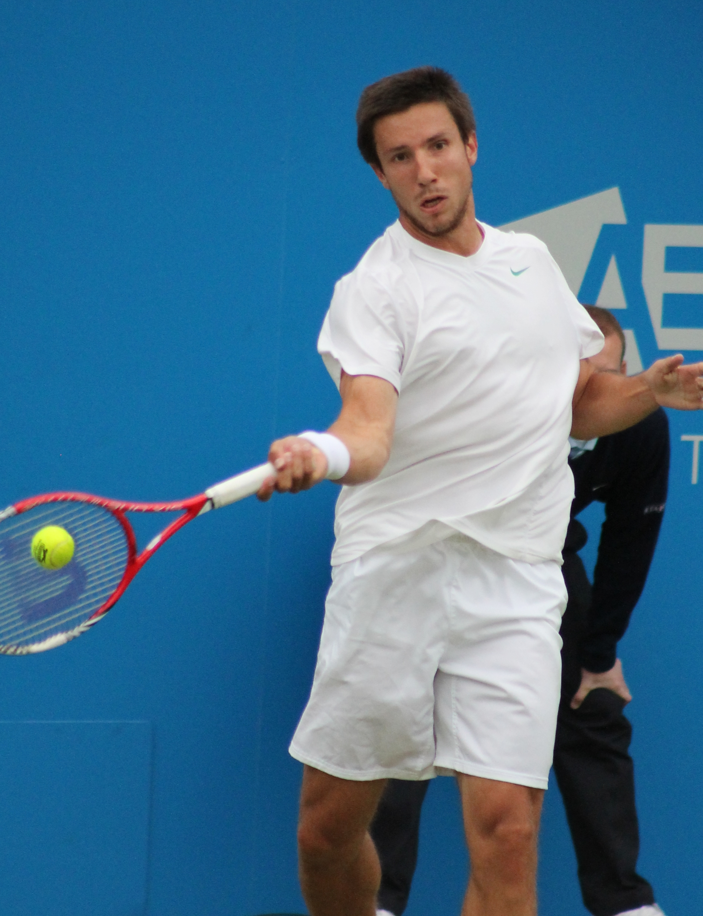 Sijsling QC13-005